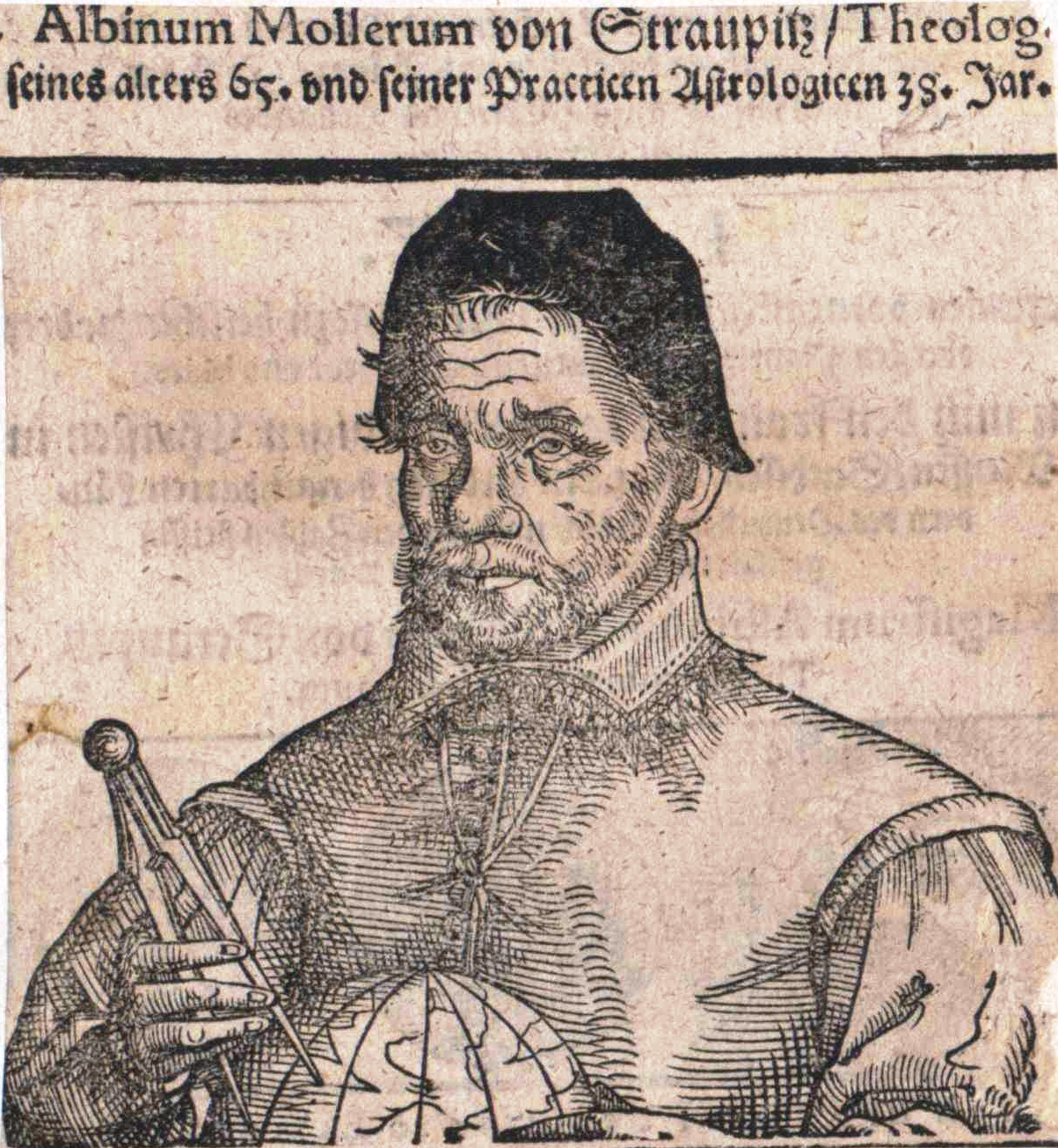 Albin Moller, sorbischer Theologe und Schriftsteller: „Albinum Mollerum von Straupitz, Theolog. seines alters 65. und seiner Practicen Astrologicen 38. Jar.“